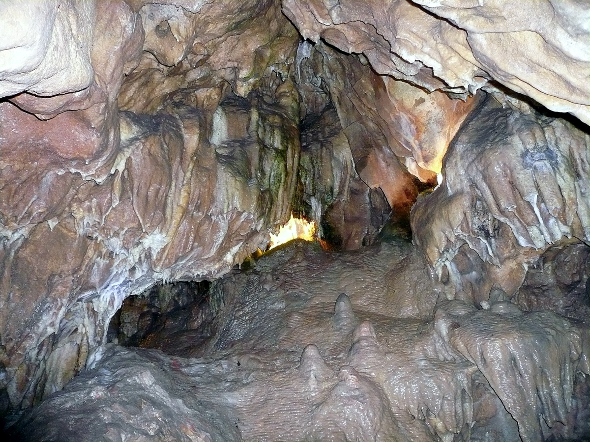 Charlottenhöhle